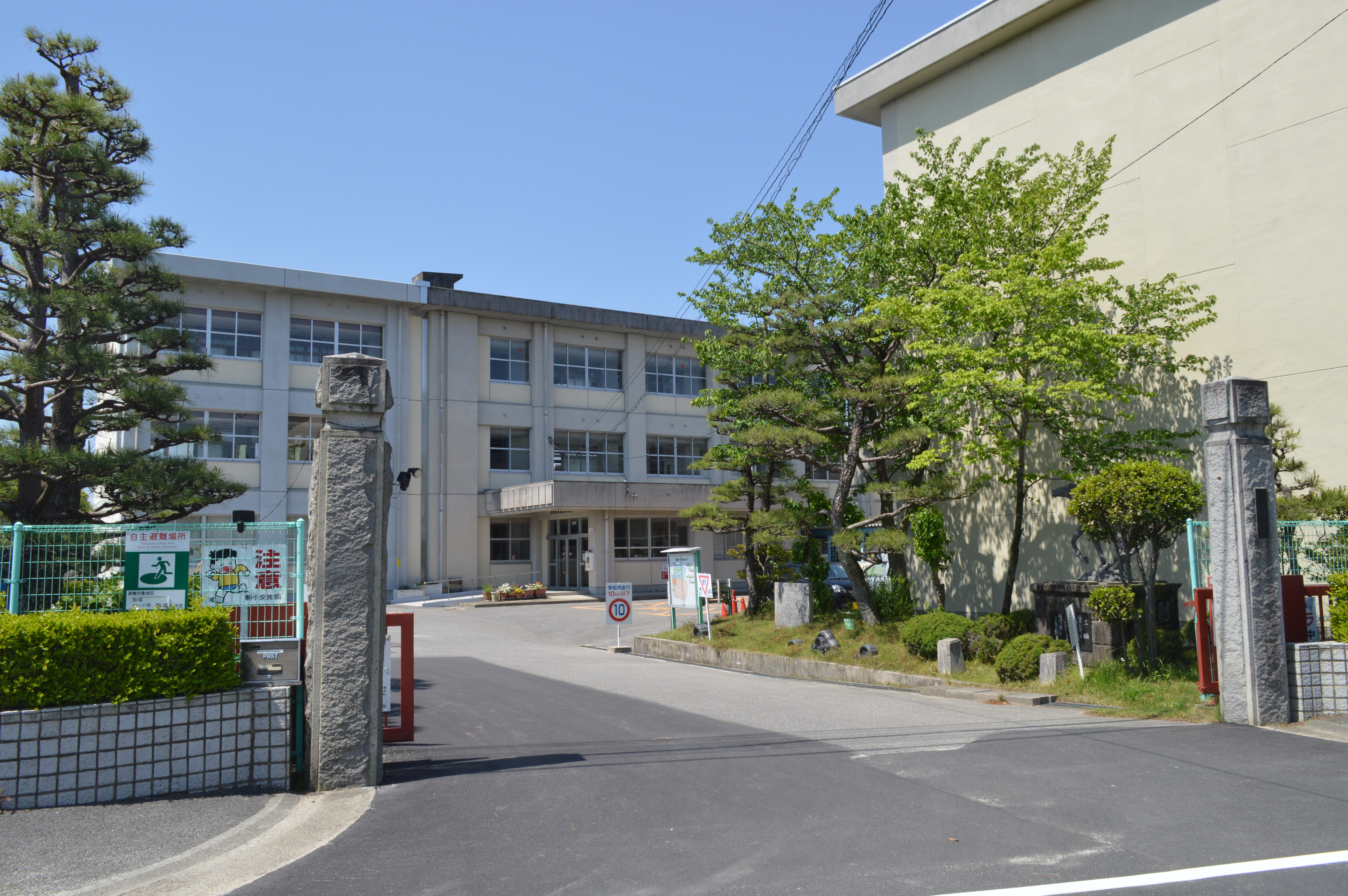 豊田市立駒場小学校 愛知県豊田市